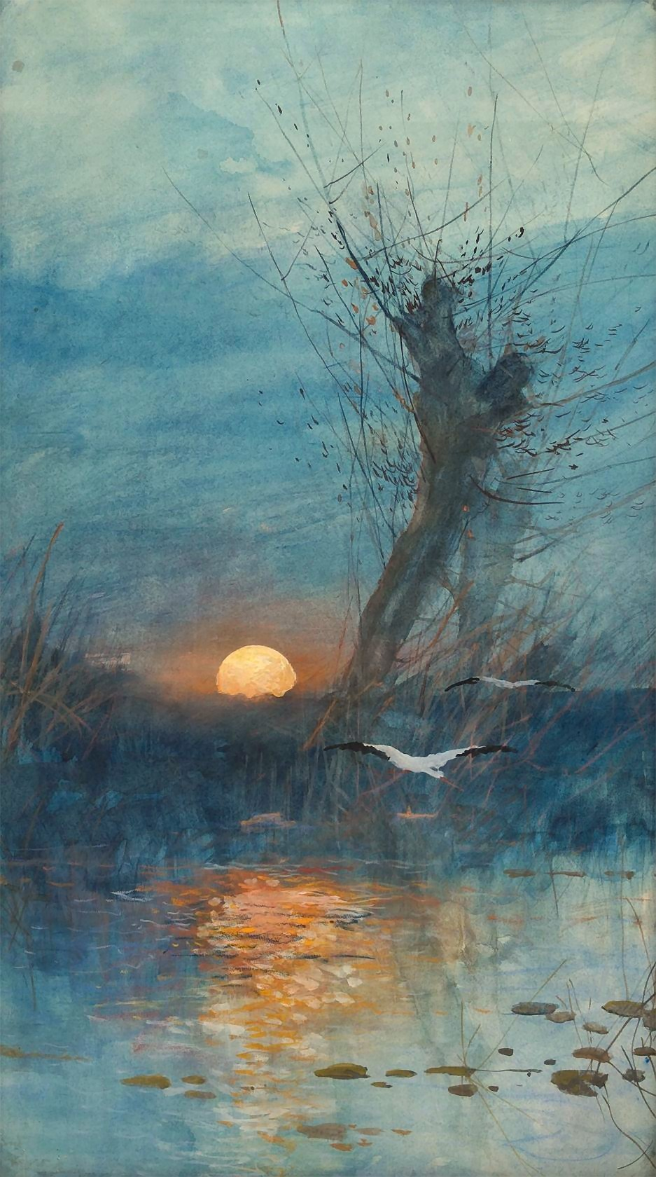 Coucher de soleil sur l'étang avec cigognes